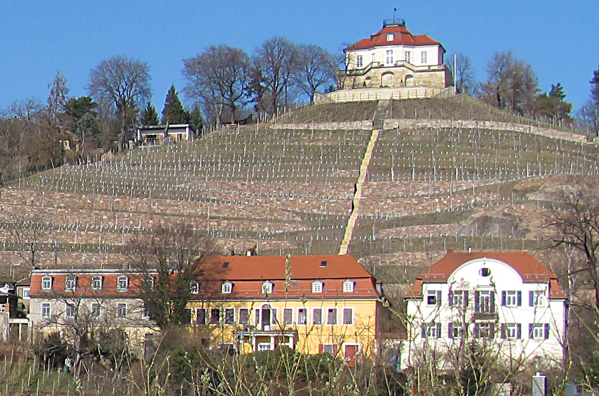 Radebeul, Neufriedstein